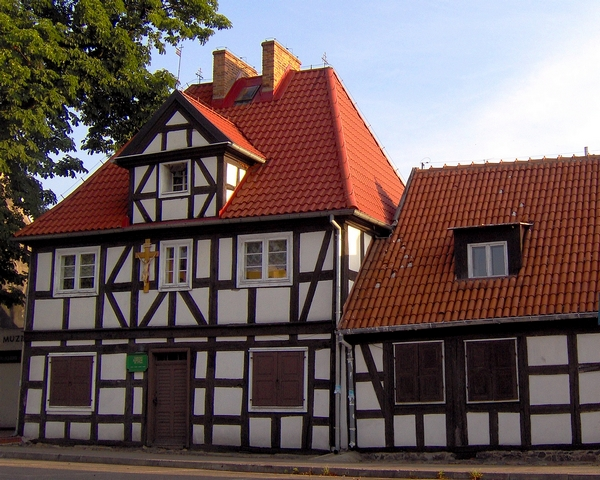 Puck, ul. Wałowa 11 - dawny XVII-wieczny szpital-przytułek, obecnie siedziba Muzeum Ziemi Puckiej (zabytek nr 550) small hospital for the poor from xvii c., now museum of puck region Autor: Krzysztof